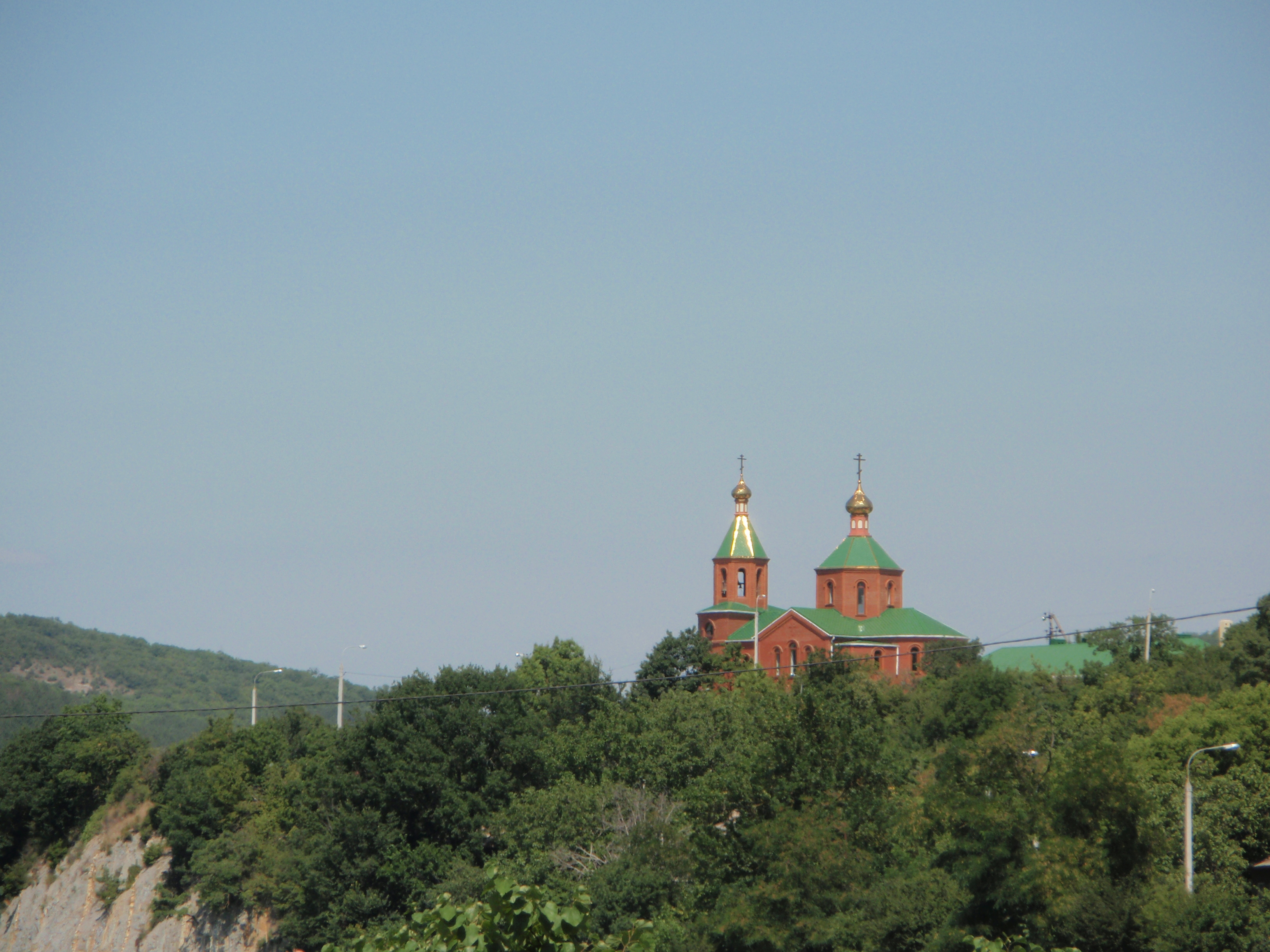 Церковь Ксении Петербургской на берегу озера Абрау (п. Абрау-Дюрсо) (1).JPG